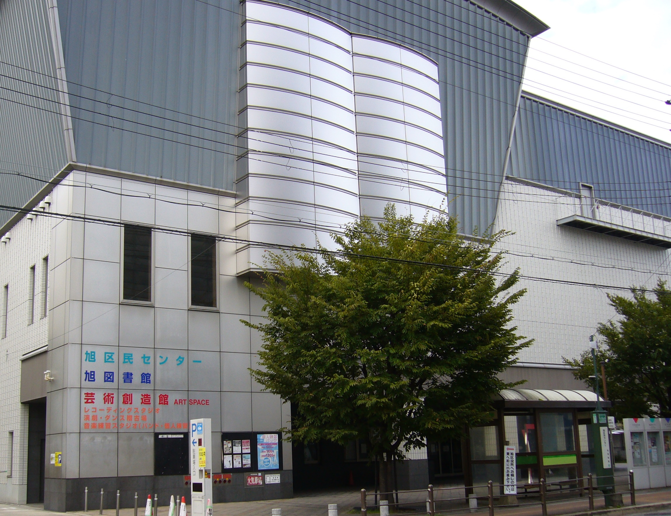 大阪市立旭図書館